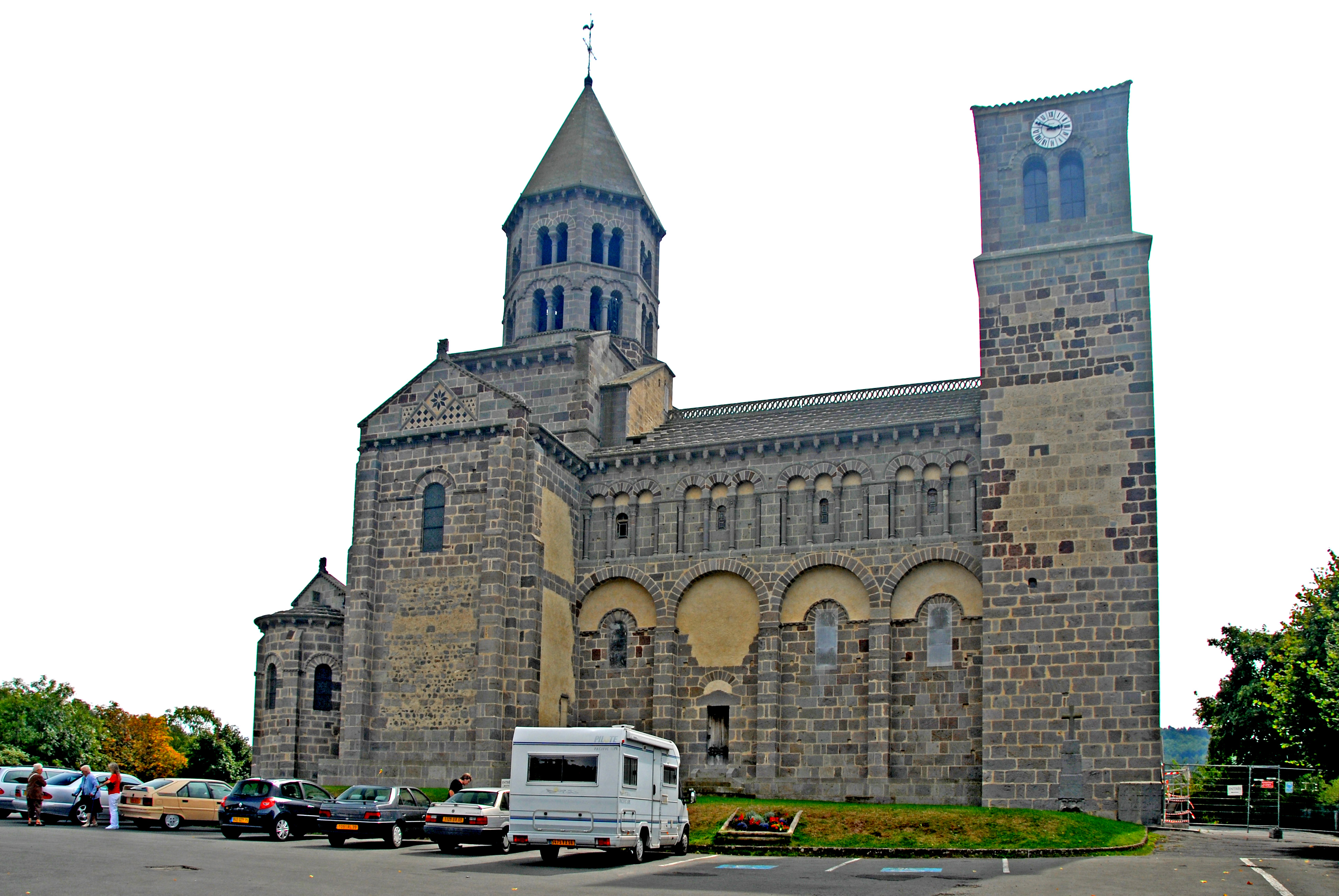 St.-Nectaire, Ansicht von N